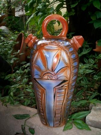 artesania en ceramica